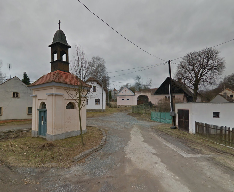 náves